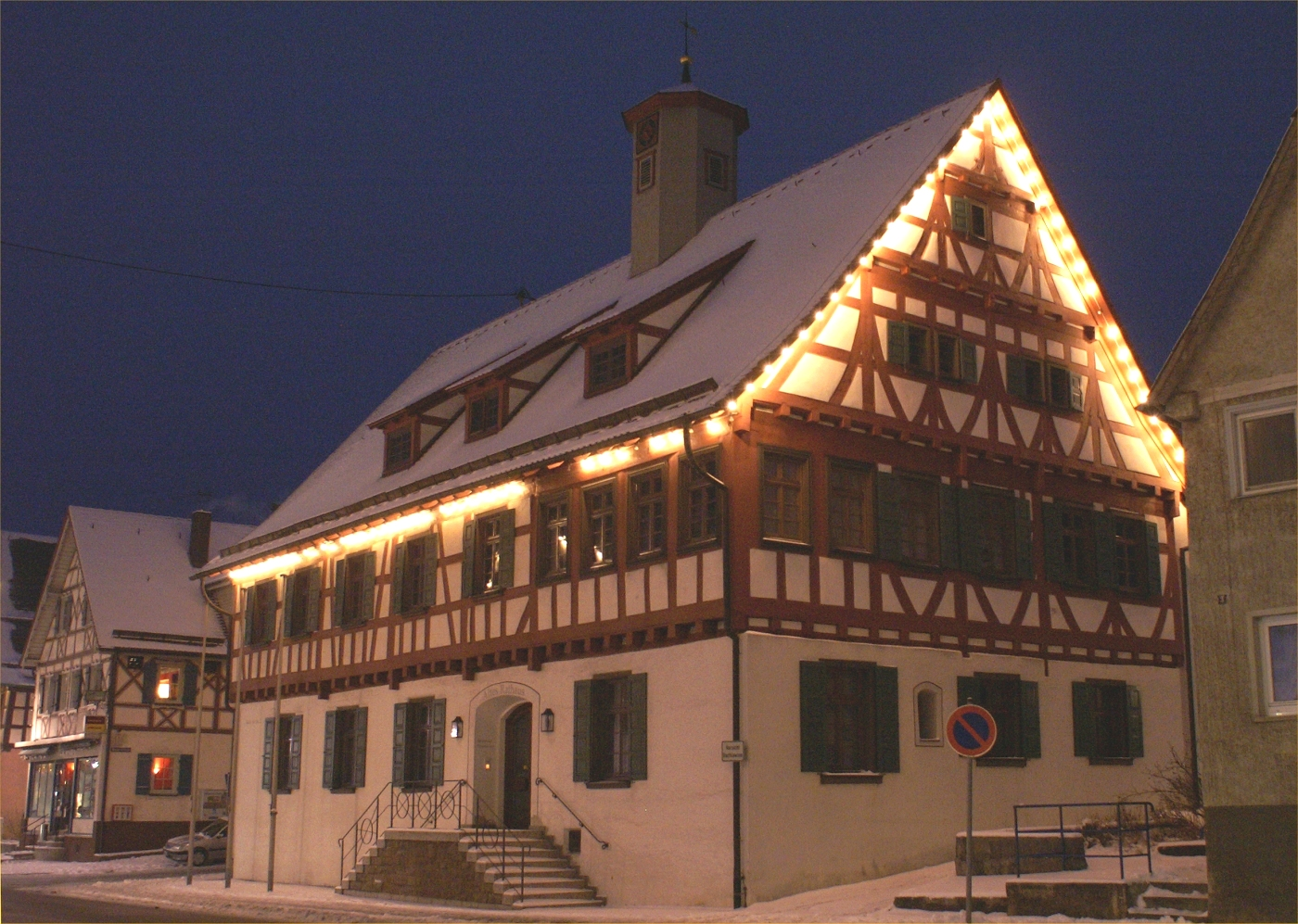 Altes Rathaus in Laichingen